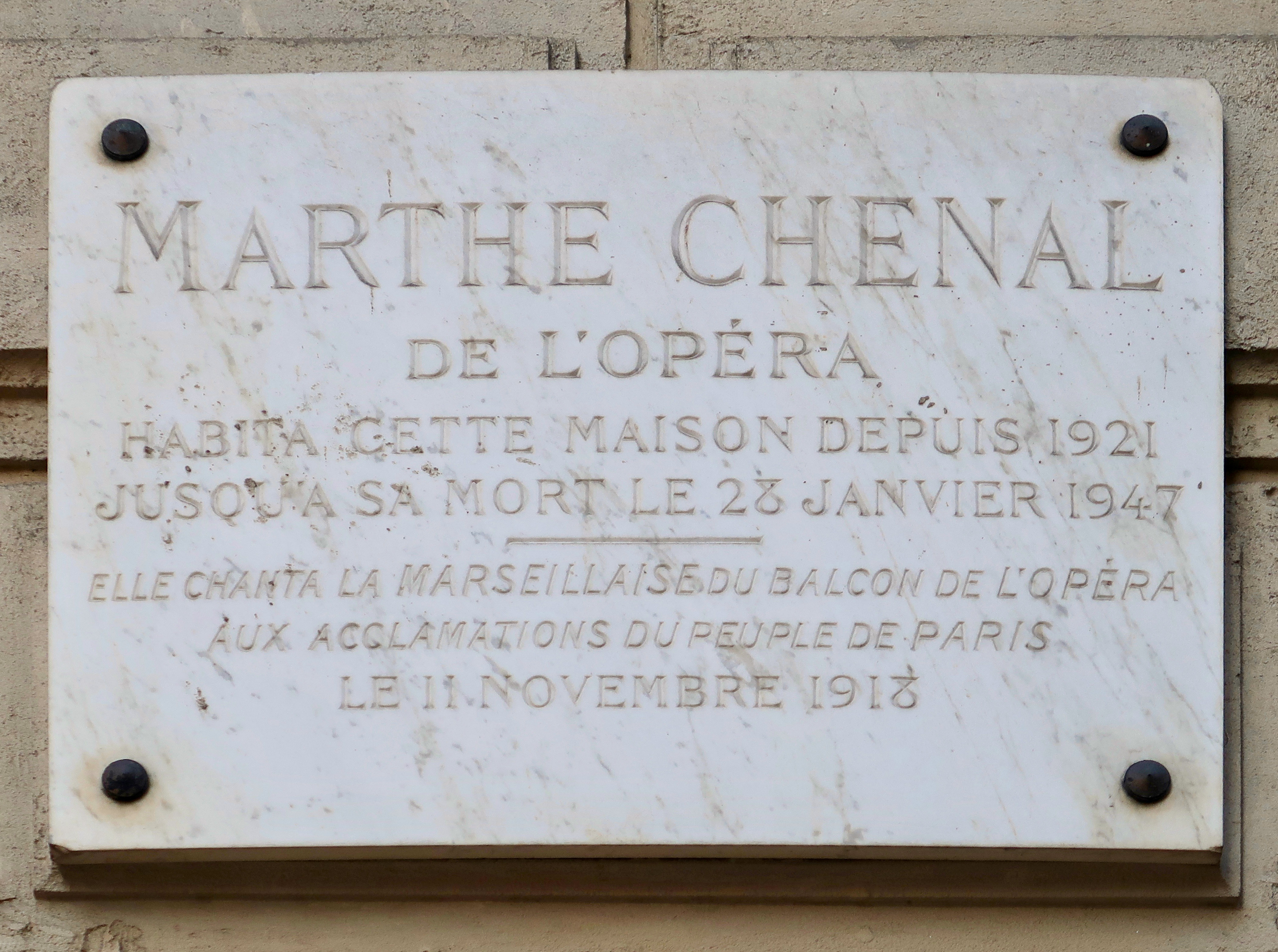 Plaque en hommage à Marthe Chenal, 94 rue de Courcelles (Paris, 8e).